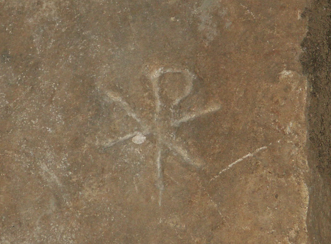 Rom, Calixtus-Katakomben, Steintafel mit Christussymbol "Chi Rho"